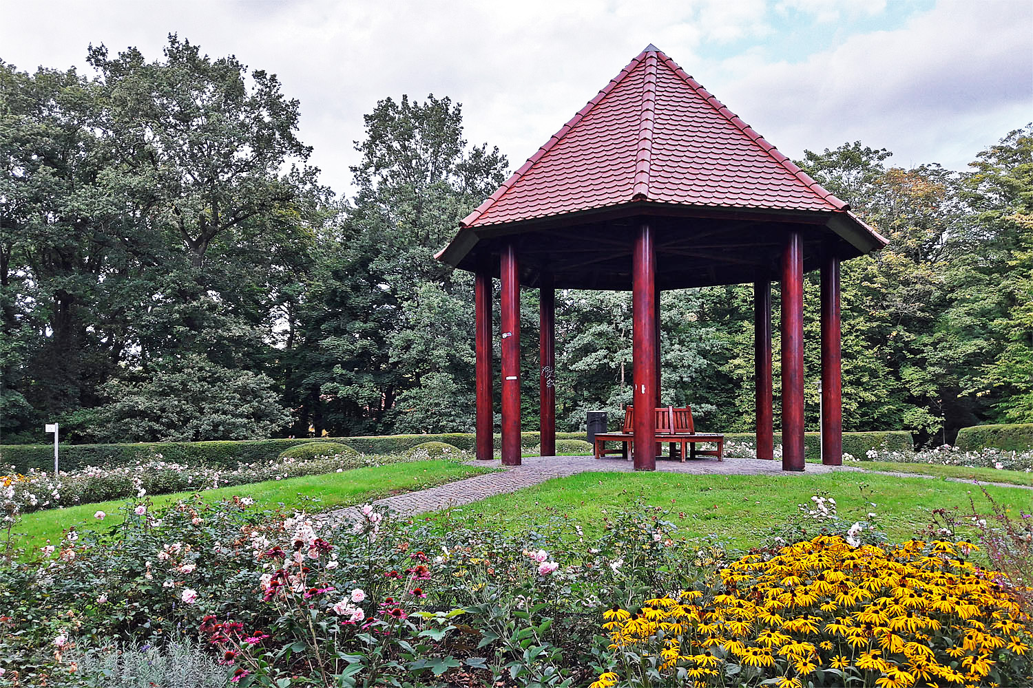 Kurpark Bad Düben (2017) Rosentempel